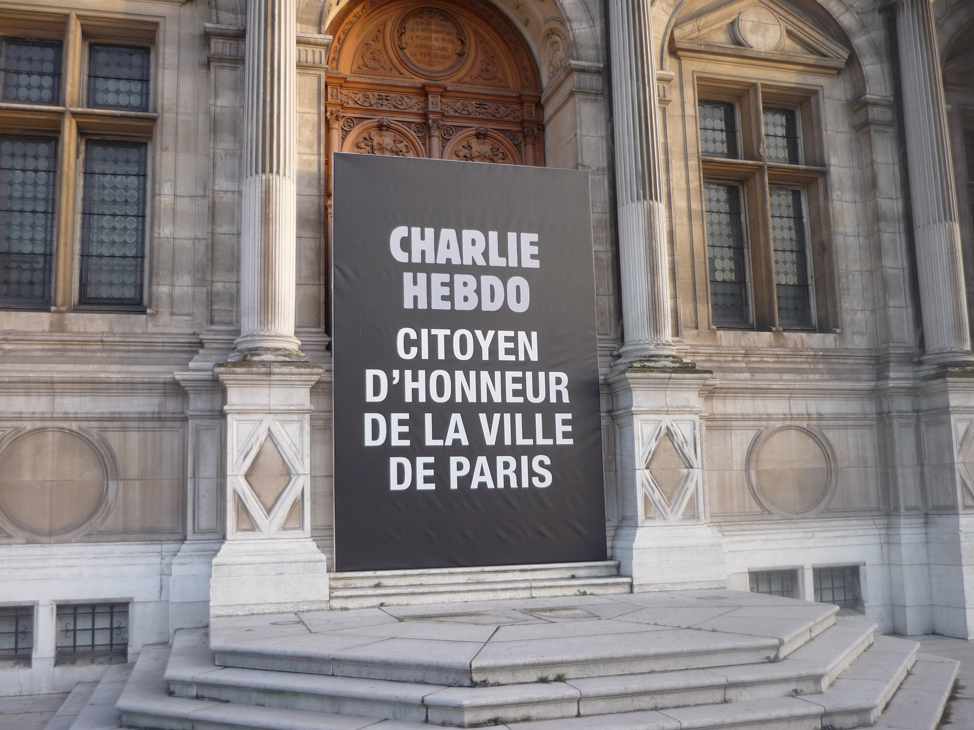 Portail d'entrée de l'Hôtel de ville de Paris : "Charlie Hebdo citoyen d'honneur de la ville de Paris".